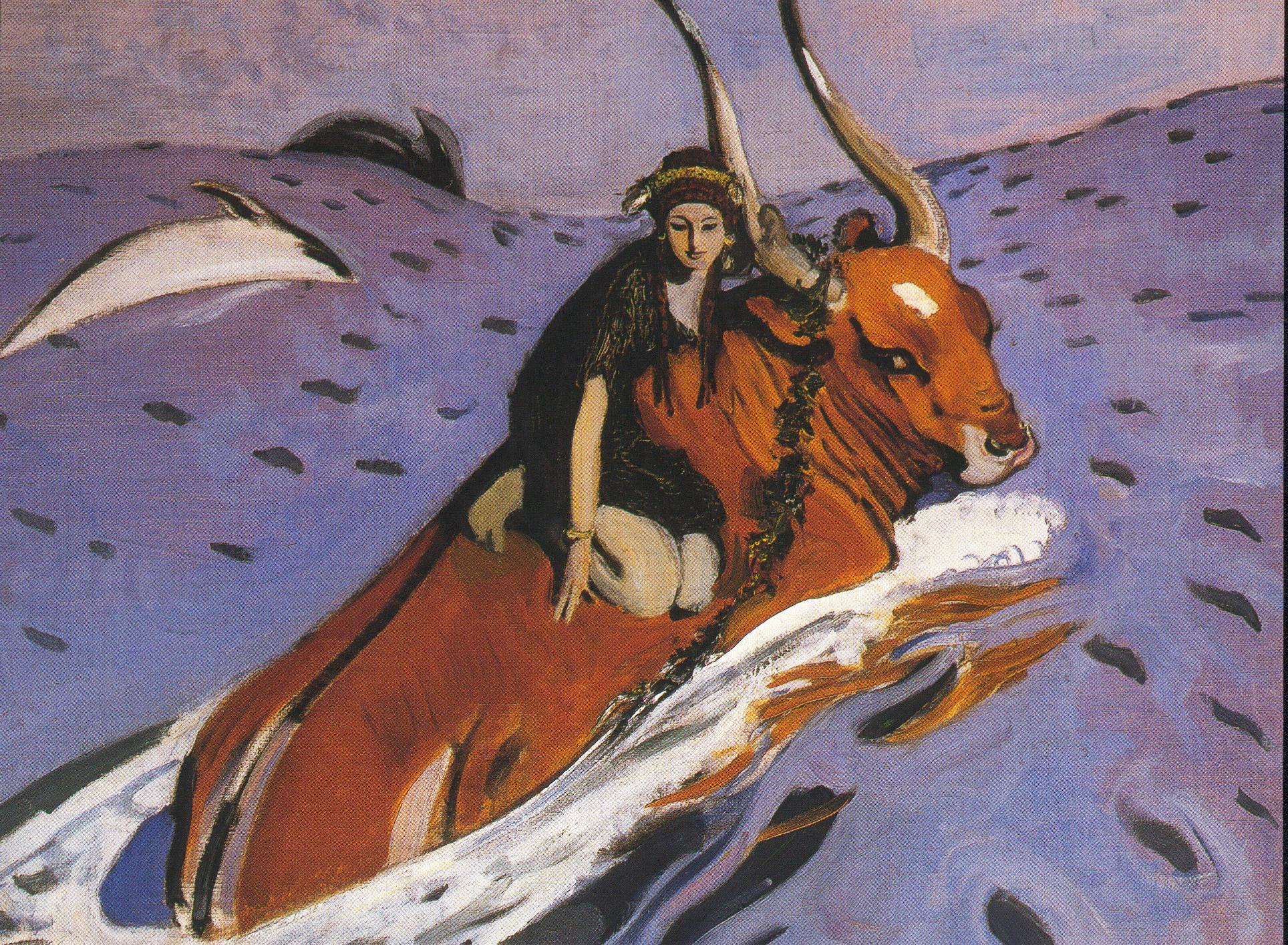 Der Raub der Europa